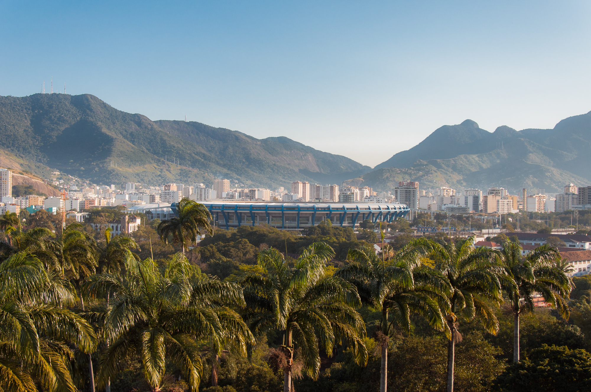 Estádio Mário Filho, conhecido como Estádio Maracanã ou simplesmente Maraca. Aqui visto a partir do telhado do Museu Nacional, na Quinta da Boa Vista, bairro de São Cristóvão, zona norte da cidade do Rio de Janeiro.